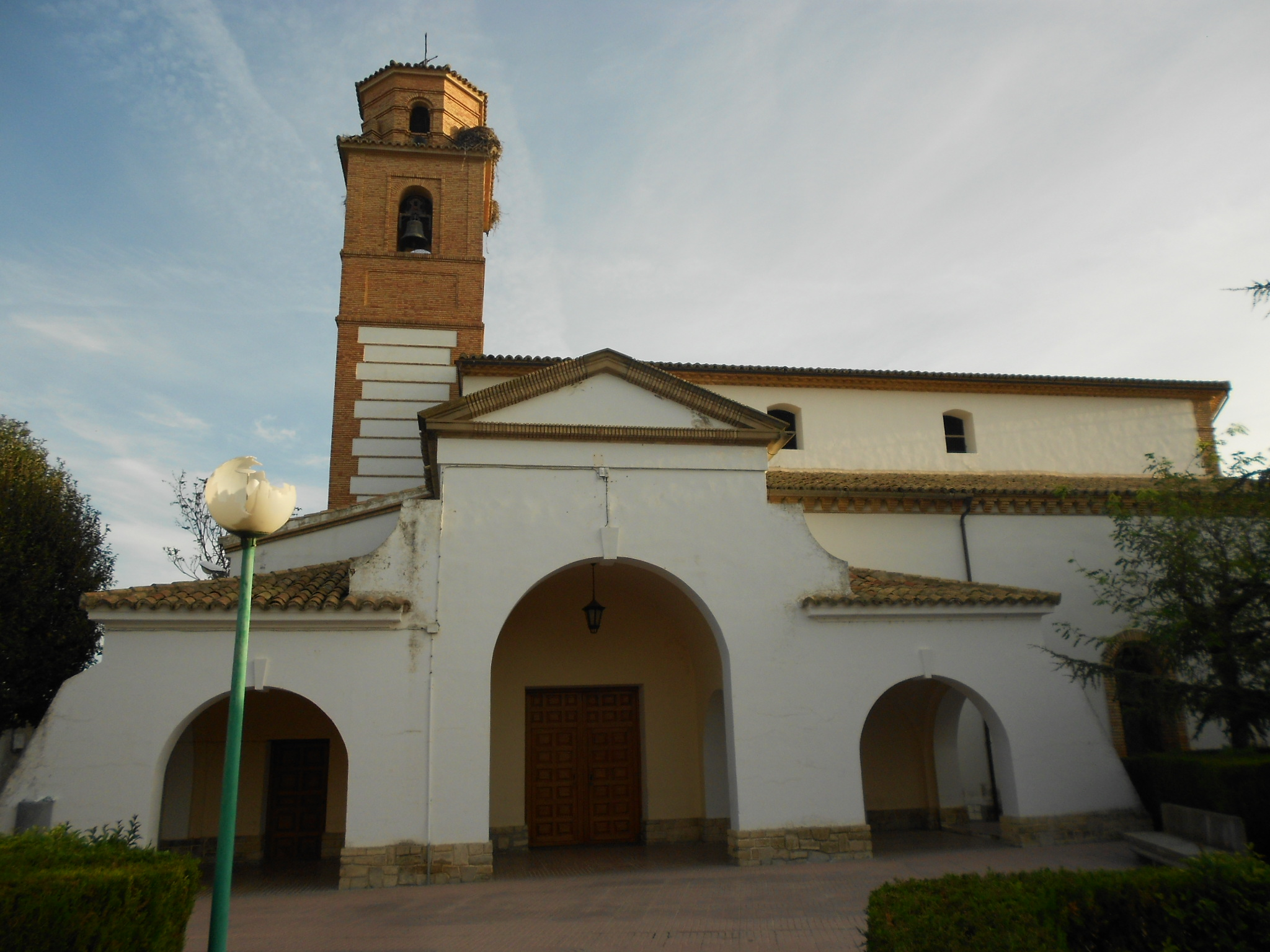 Iglesia parroquial de Santiago el Mayor (Tardienta, España). De estilo gótico tardío, data del siglo XVI.